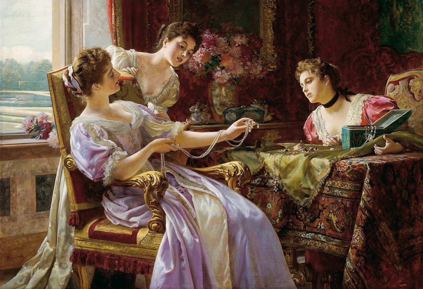 Ladislaus Wladislaw von Czachorski, Das Schatzkästchen, Öl auf Leinwand, 92 × 127 cm (Zwölf telefonische Bieter kämpften um Ladislaus Wladislaw von Czachorskis lichtdurchflutetes Gemälde, auf dem drei vornehme Damen „Das Schatzkästchen“ voller Perlenketten und Schmuckstücken begutachten. Die Gebote für dieses charakteristische Bild des Vertreters gründerzeitlicher Malerei der Münchner Piloty-Schule kletterten von 35.000 Euro auf hervorragende 216.000 Euro [1]